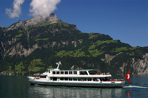 Das Motorschiff "Brunnen" fährt an der Tellskapelle vorbei. (Nr. 03.1-8811)